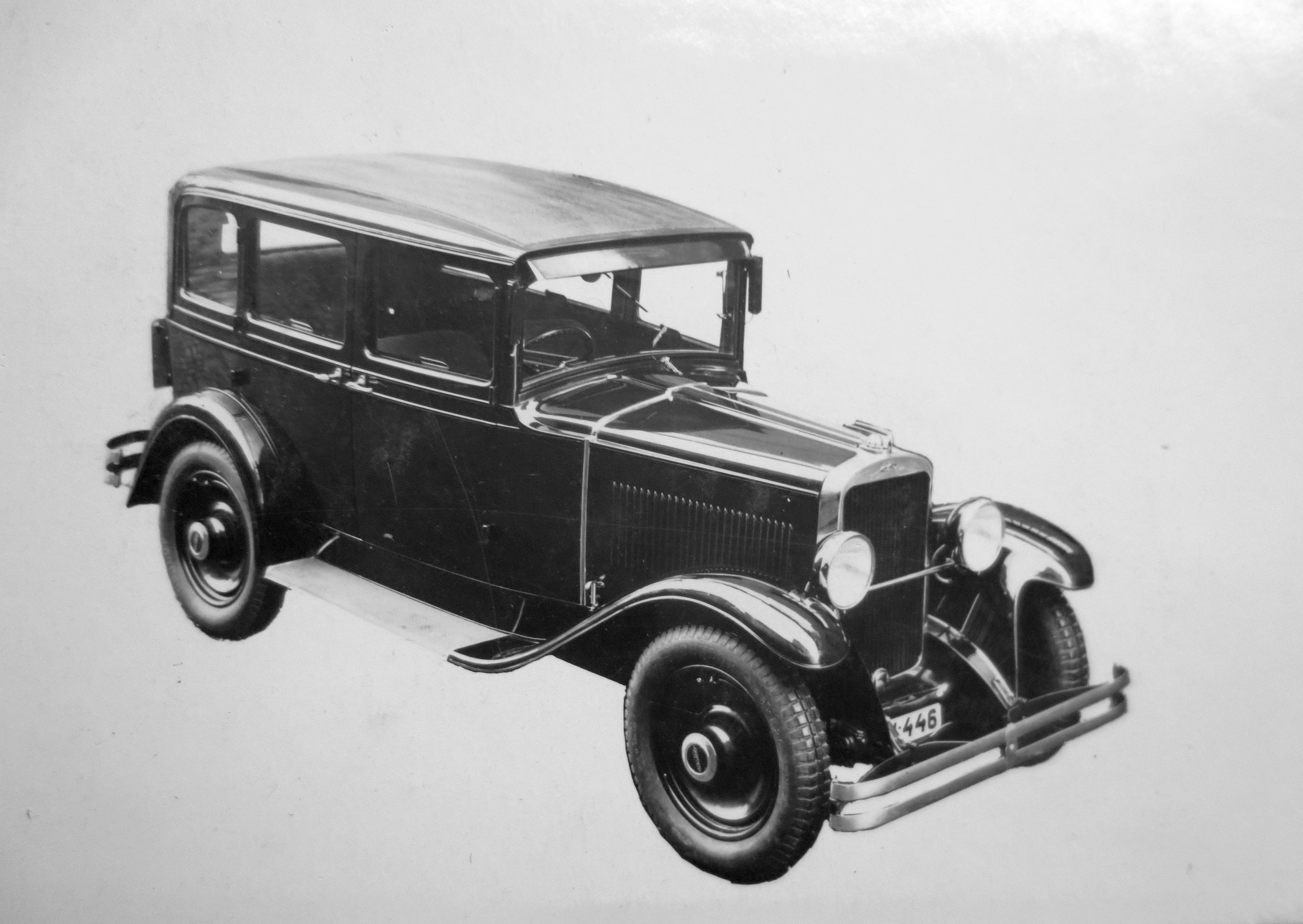 Walter Bijou (1931) limuzína, lincence FIAT 514